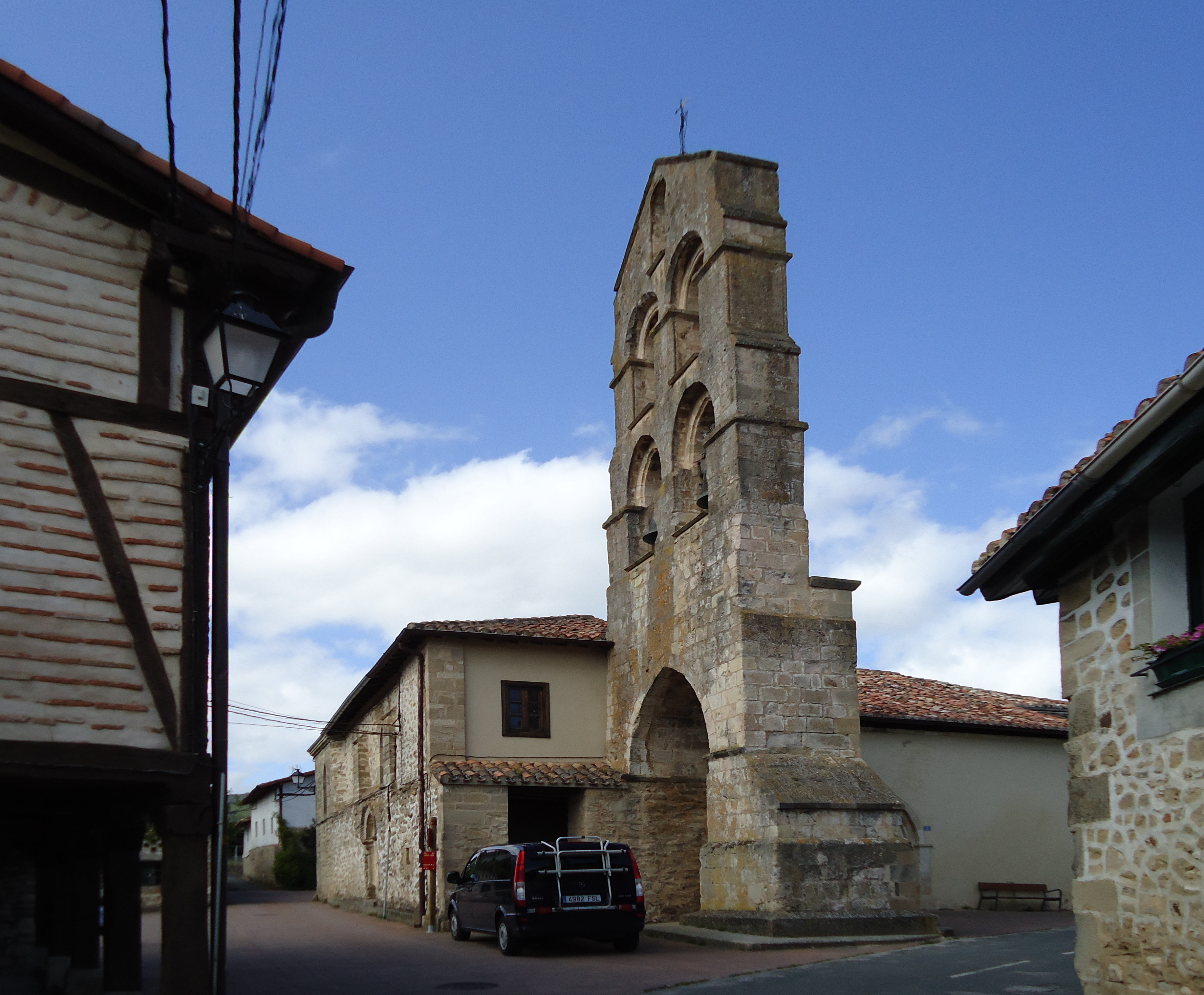 Villamaderneko eliza